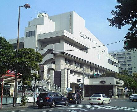 福岡市早良区の藤崎バスターミナル